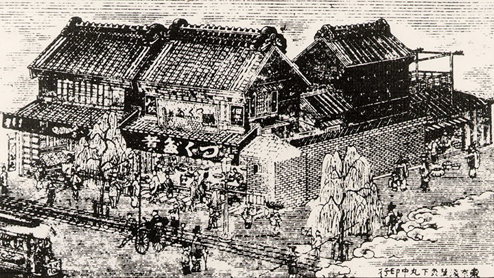 鮒佐の明治時代の店舗